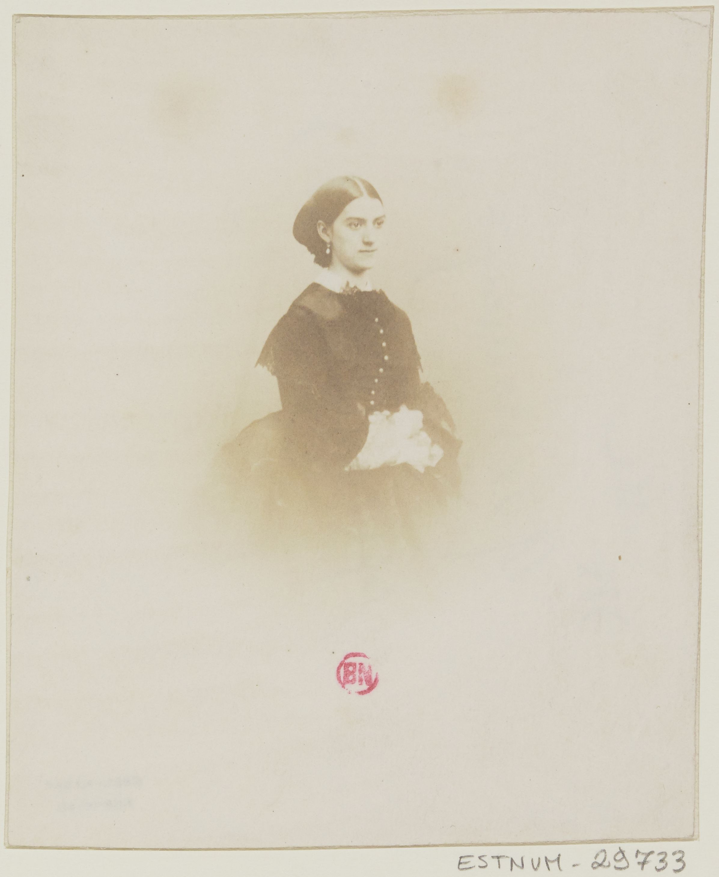 Portrait de Constance Quéniaux (1832-1908), danseuse du ballet de l'opéra de Paris, modèle de Gustave Courbet pour le tableau l'Origine du Monde, photographie de Nadar.